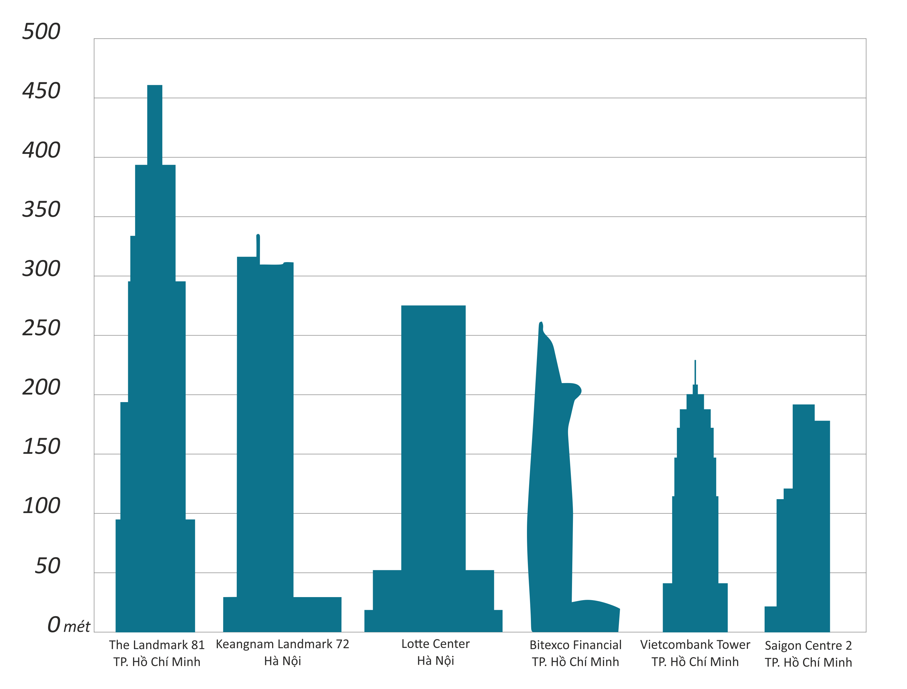 Danh sách các công trình cao nhất Việt Nam